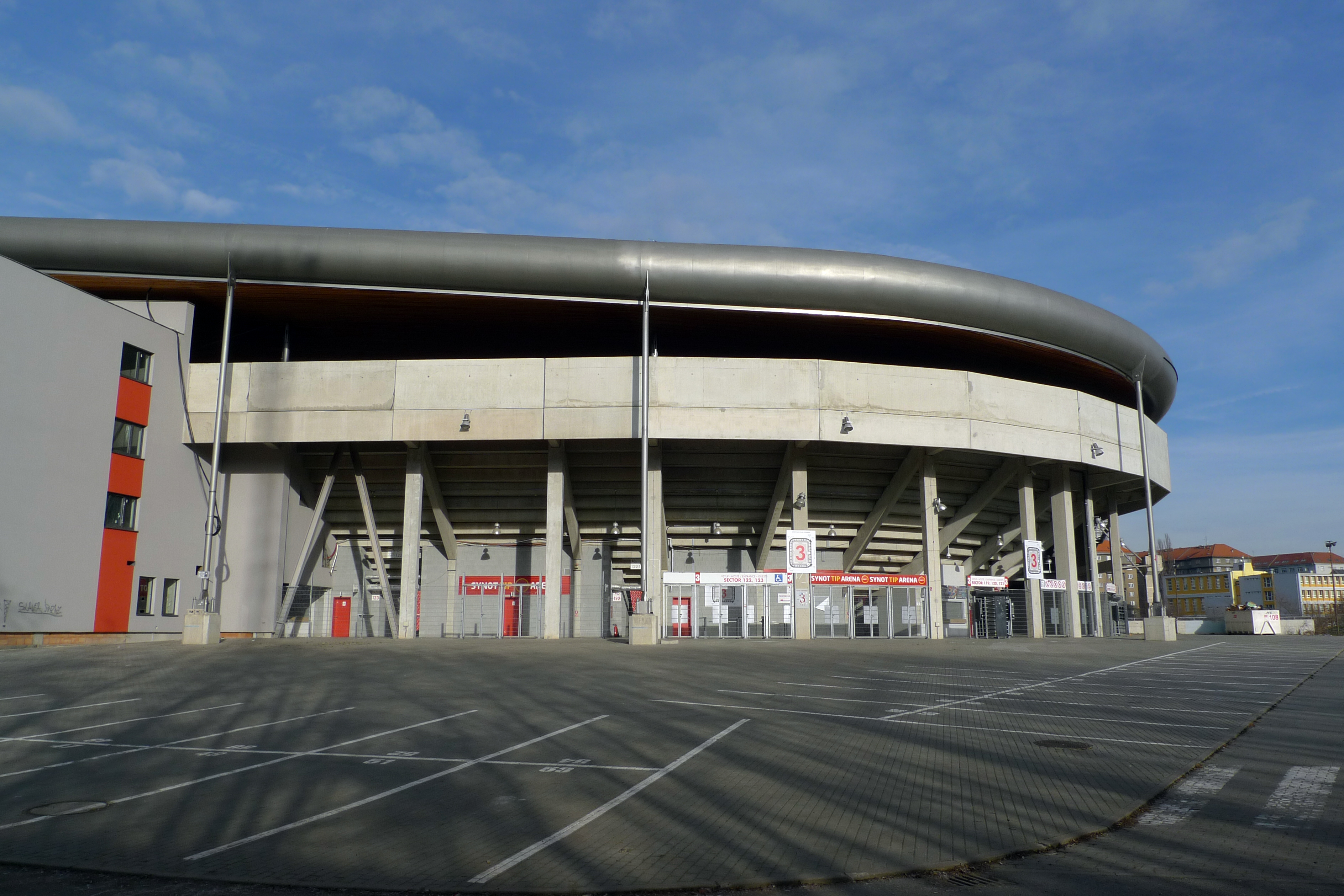 Eden Aréna zezadu od železniční trati.